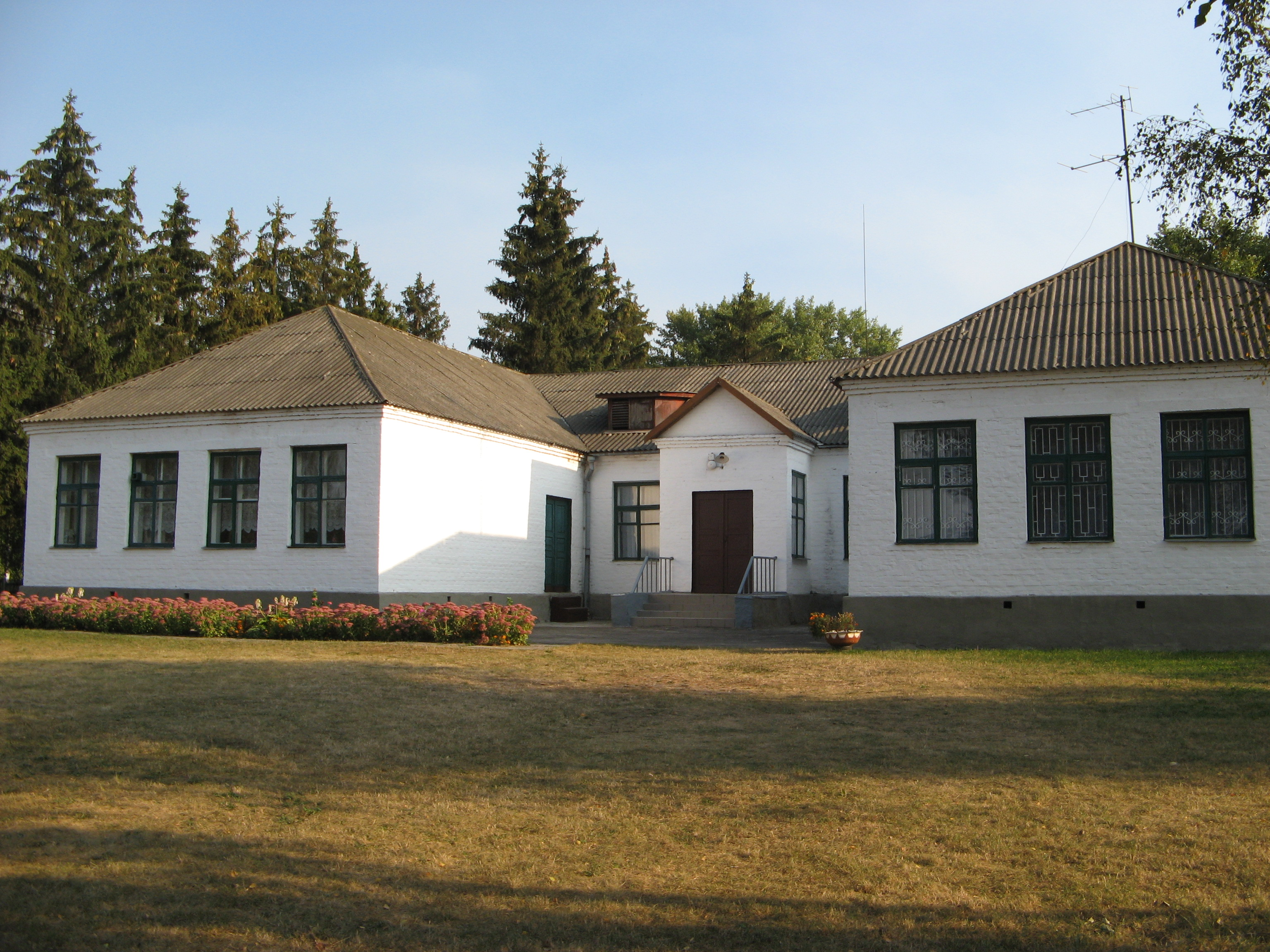 Село Шаповалівка (Конотопський р-н). Школа.